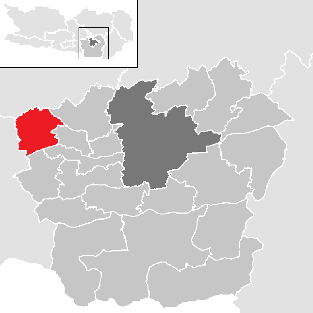 Bezirk Klagenfurt-Land